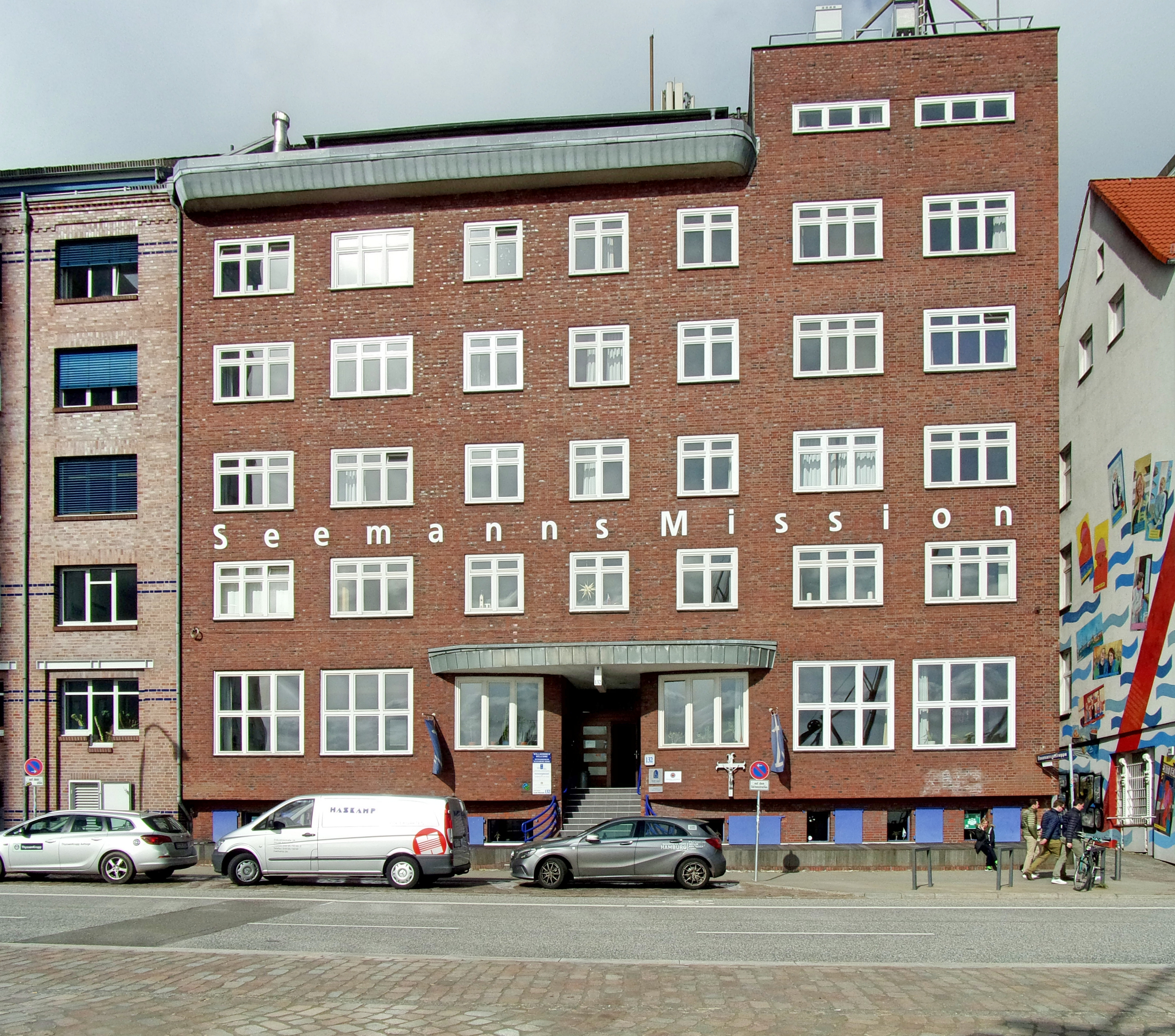 Die Deutsche Seemannsmission in Hamburg-Altona in der Großen Elbstraße ist Diakonie, Seemannsheim und Hotel. Das Gebäude wurde 1929 erbaut, Ausführung Kurt Stoltenberg und steht unter Denkmalschutz. Mehr Infos im folgenden Link; This is a photograph of an architectural monument.